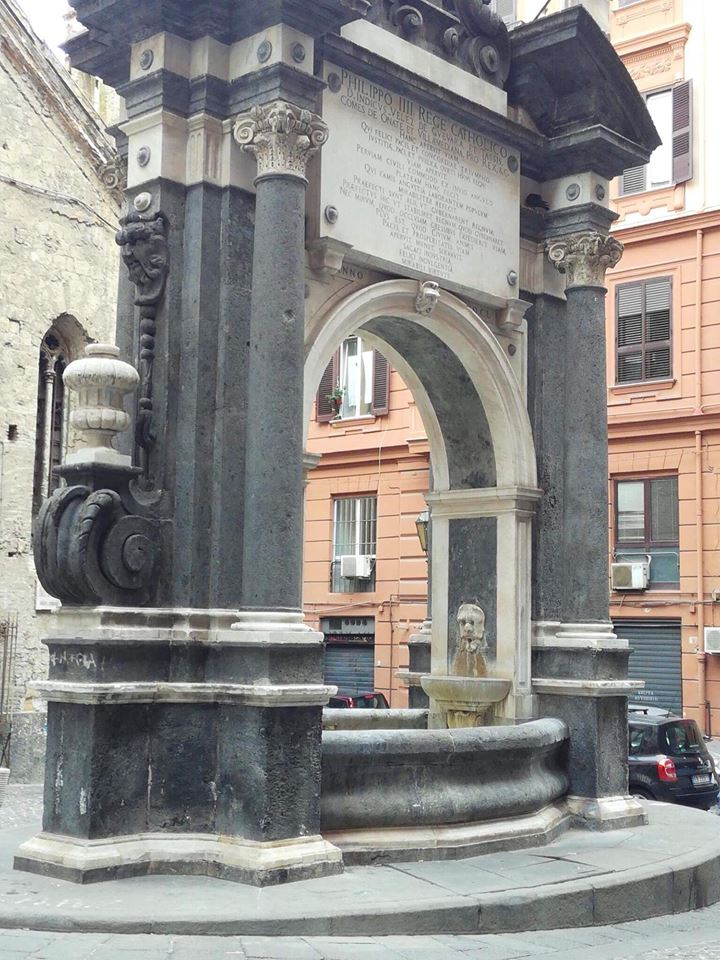 Fontana sella Sellaria